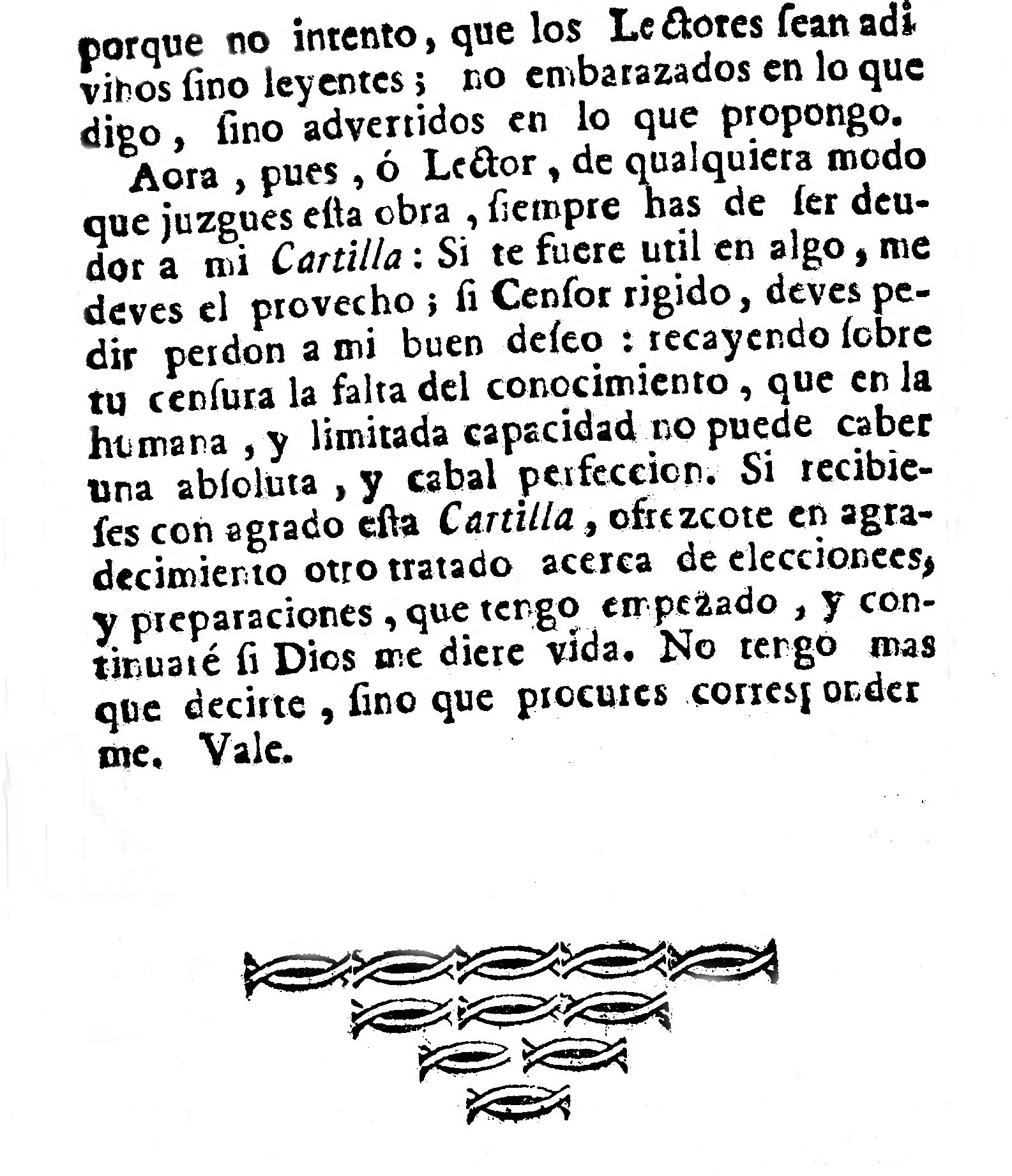 viñaburu fin introducción